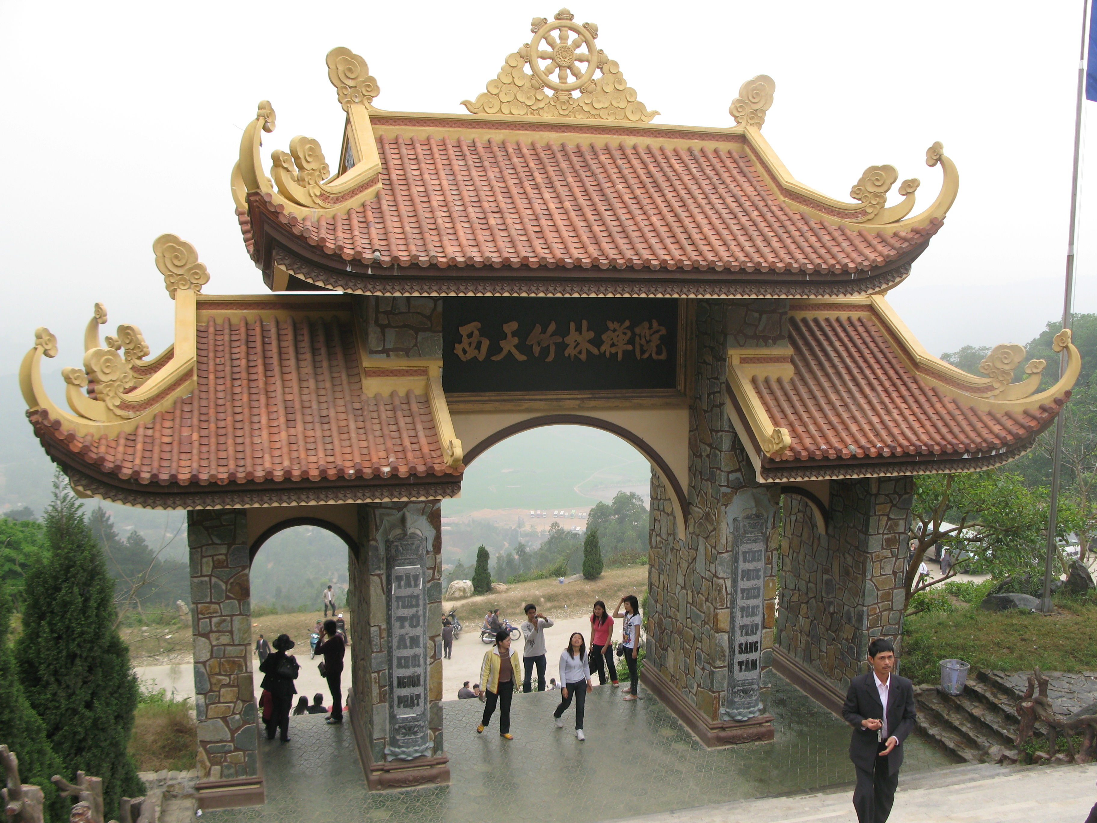 Cổng Tam Quan của Thiền viện Trúc lâm Tây Thiên nhìn từ bên trong, huyện Tam Đảo, tỉnh Vĩnh Phúc, Việt Nam